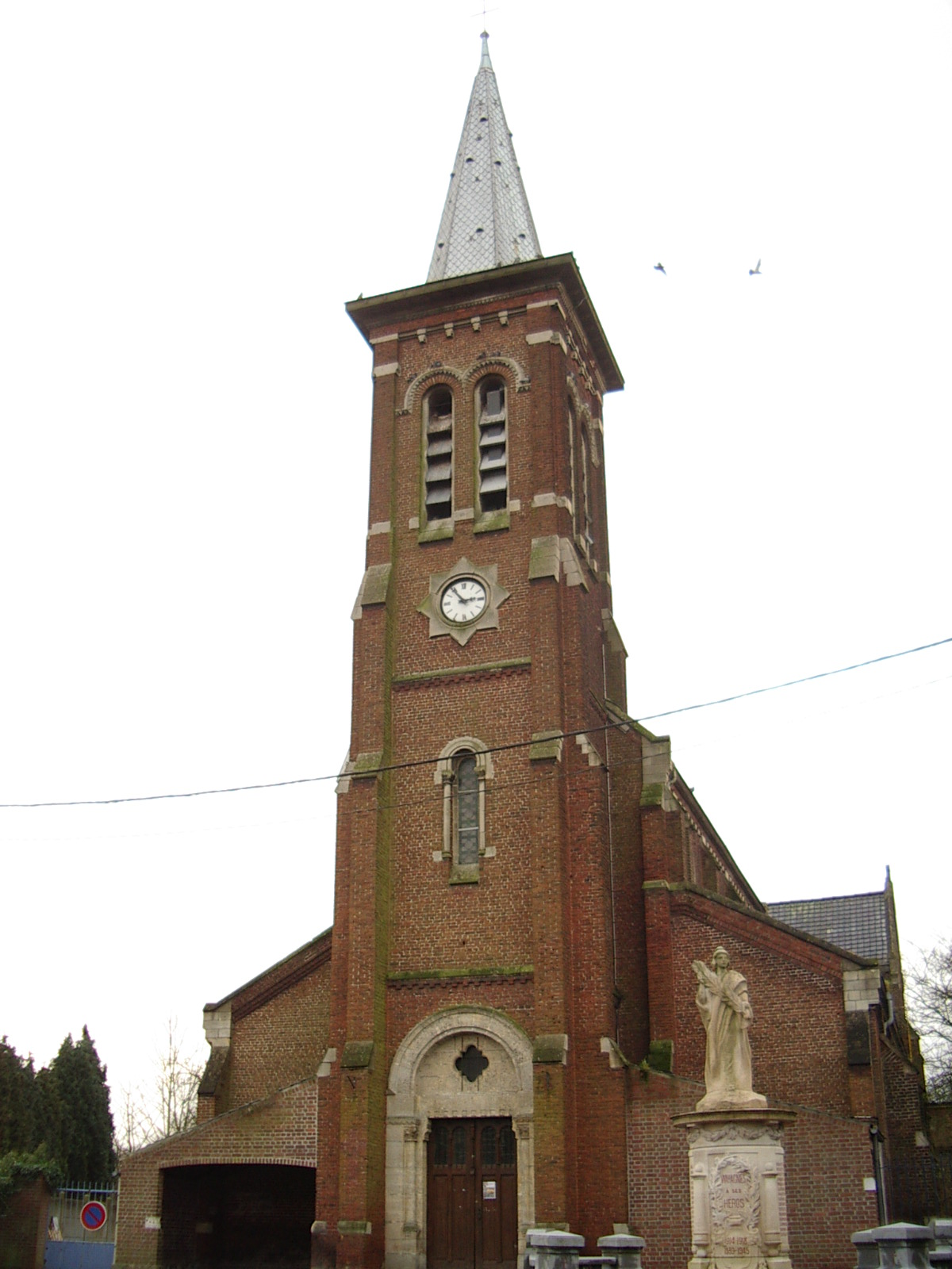 Eglise Saint Barthélémy Wahagnies